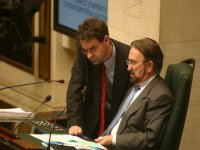 Zelfgemaakte foto.